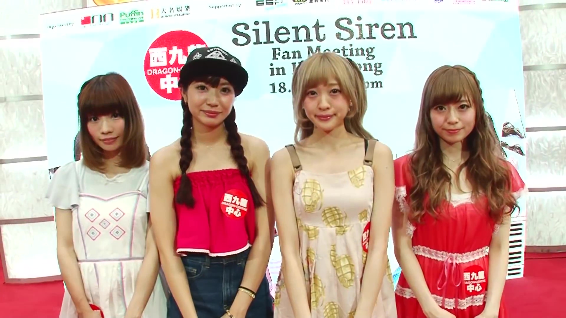 中文（香港）: Silent Siren Fan Meeting in Hong Kong @ 西九龍中心